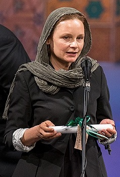 اختتامیه سی و ششمین جشنواره جهانی فیلم فجر